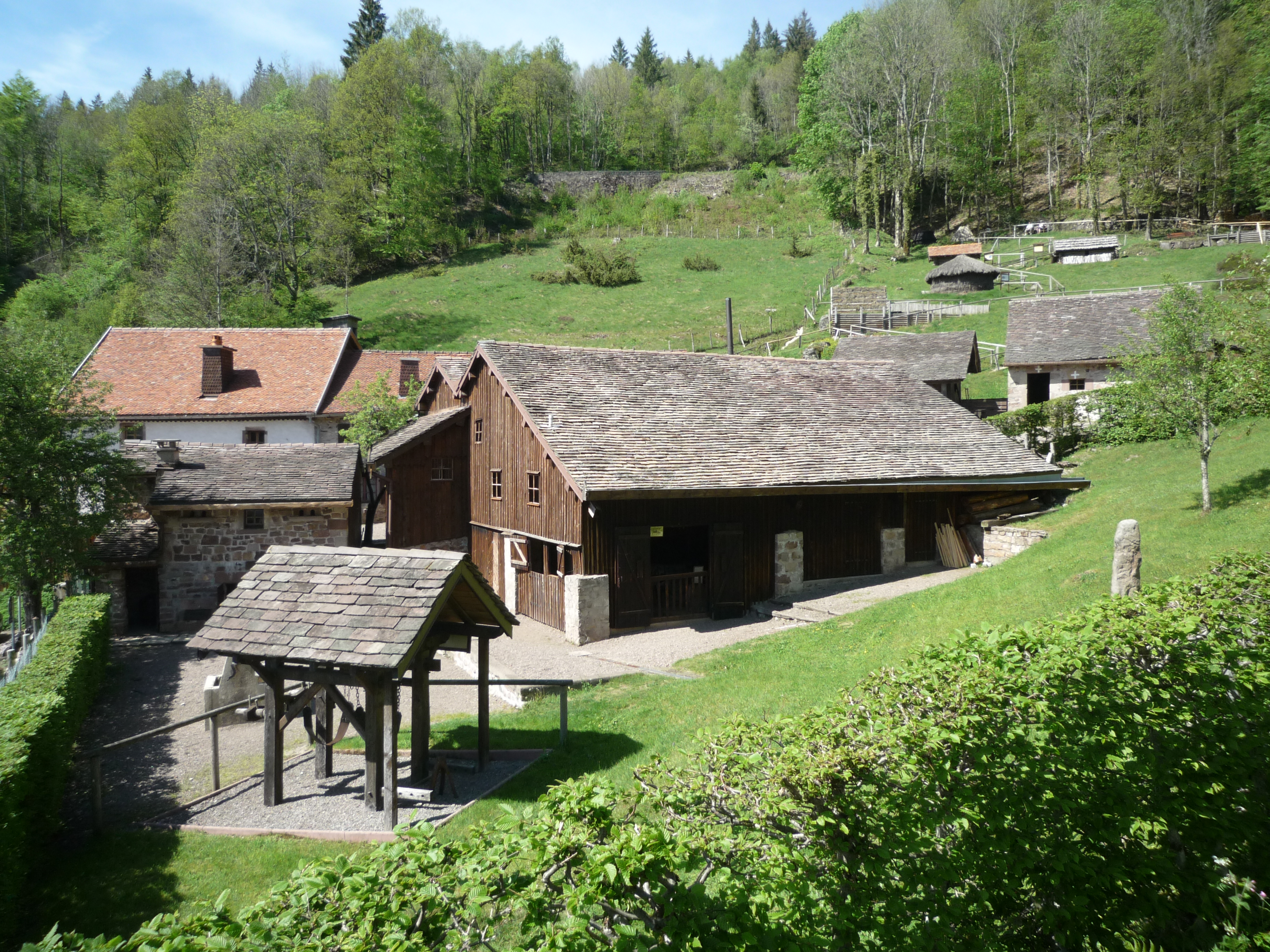 Au premier plan, le travail (tripalium) qui servait au ferrage des boeufs.